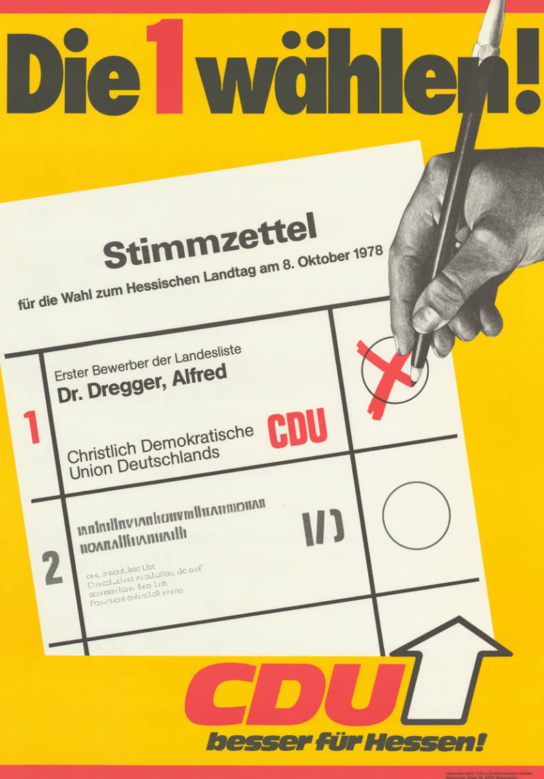 Die 1 wählen! Stimmzettel für die Wahl zum Hessischen Landtag am 8. Oktober 1978 1 Erster Bewerber der Landesliste Dr. Alfred Dregger CDU 2 ... CDU besser für Hessen! Abbildung: Stimmzettel mit Stimmkreuz Plakatart: Kandidaten-/Personenplakat ohne Porträt Auftraggeber: Verantw.: CDU-Landesverband Hessen, Wiesbaden Objekt-Signatur: 10-007 : 454 Bestand: Landtagswahlplakate Hessen (10-007) GliederungBestand10-18: Landtagswahlplakate Hessen (10-007) » CDU Lizenz: KAS/ACDP 10-007 : 454 CC-BY-SA 3.0 DE